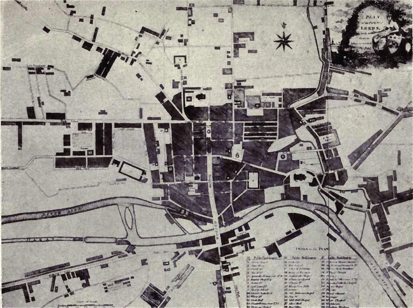 Leeds map, 1806